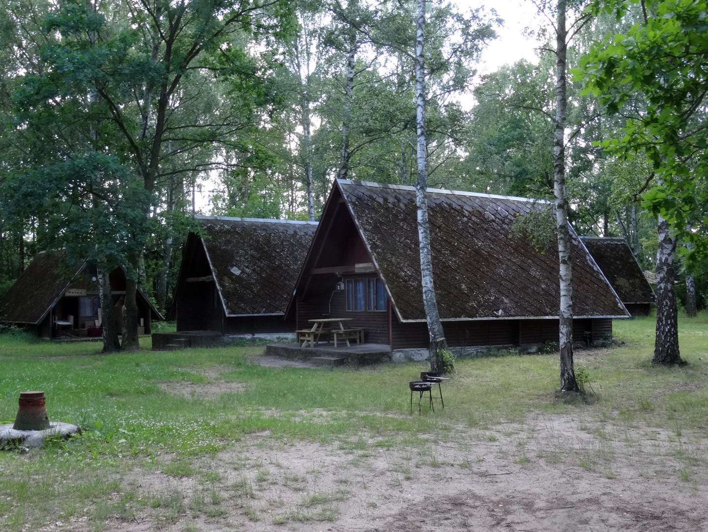 Stanica wodna i ośrodek kempingowo-namiotowy nad rzeką Brdą w Bydgoszczy, ul. Biwakowa 8. Obiekt PTTK "Na Szlaku Brdy"